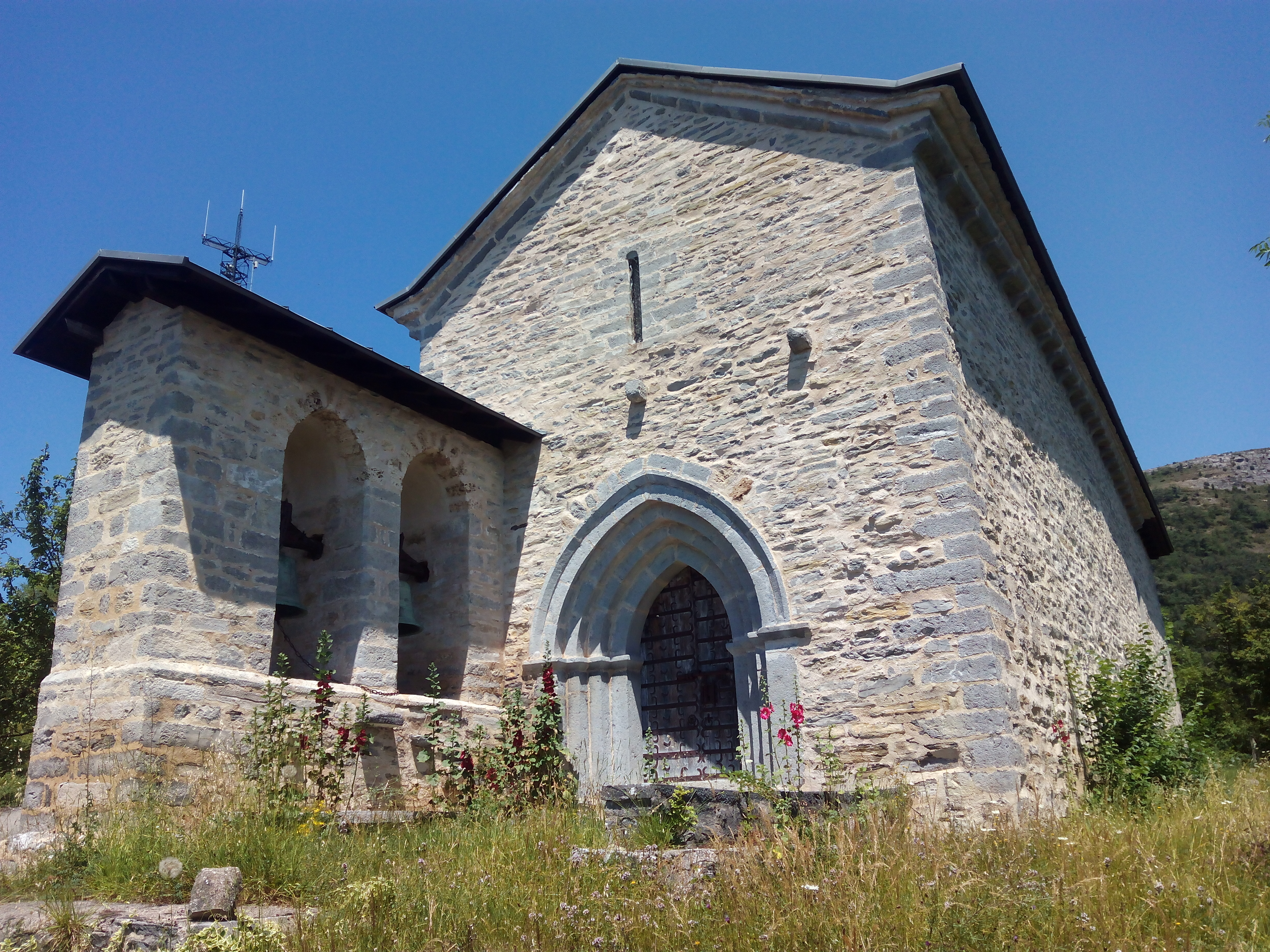 San Andres eliza erromanikoa (Tortura, Kuartango, Araba)